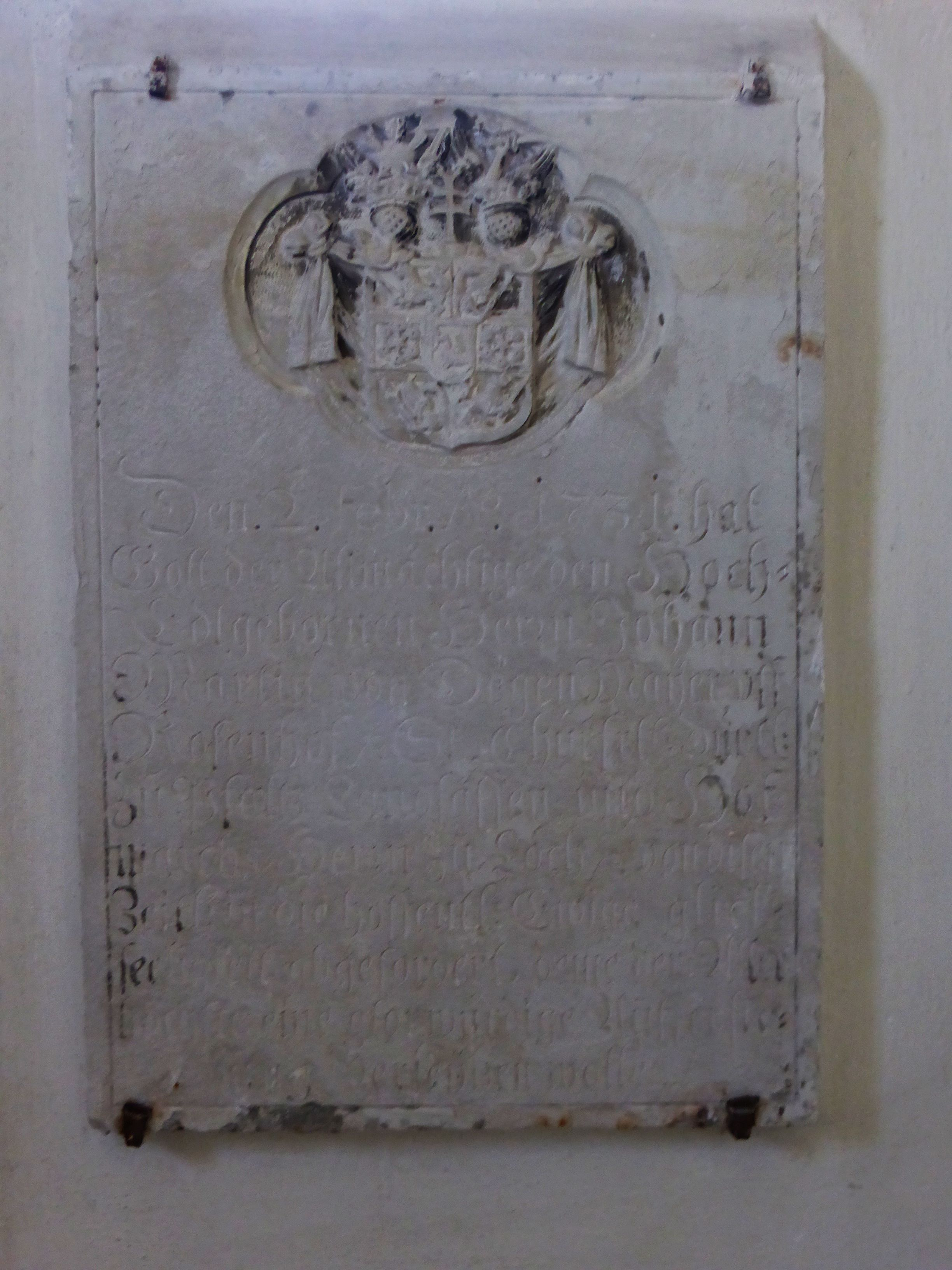 Grabstein von Johann Martin von Degenmayer (verst. 2. Feb. 1731) in der Pfarrkirche Sankt Michael von Eitelbrunn